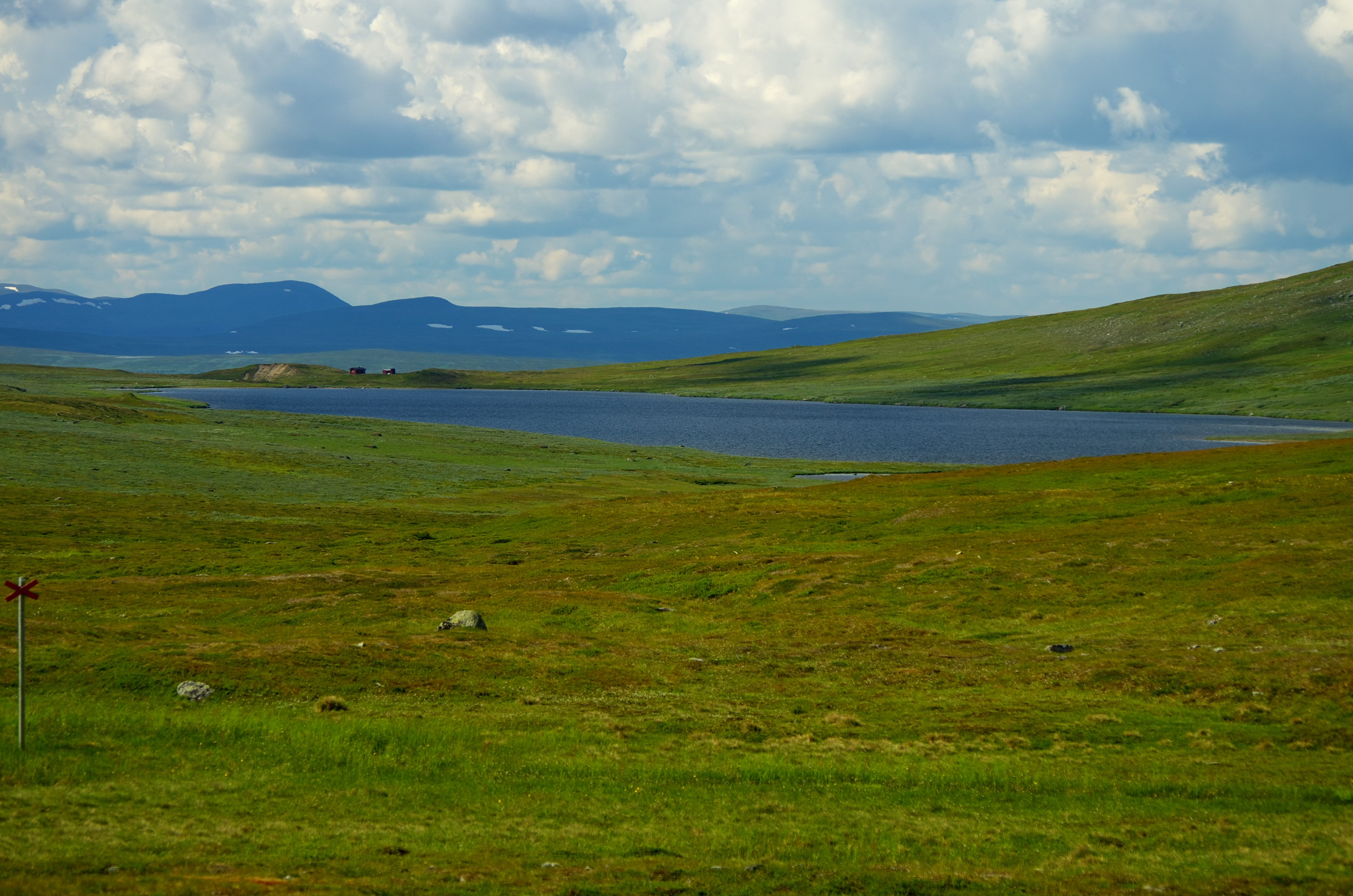 Lisvojaure eller (Lisvuojávrre) är en sjö i Sorsele kommun i Lappland. Kungsleden passerar sjö.